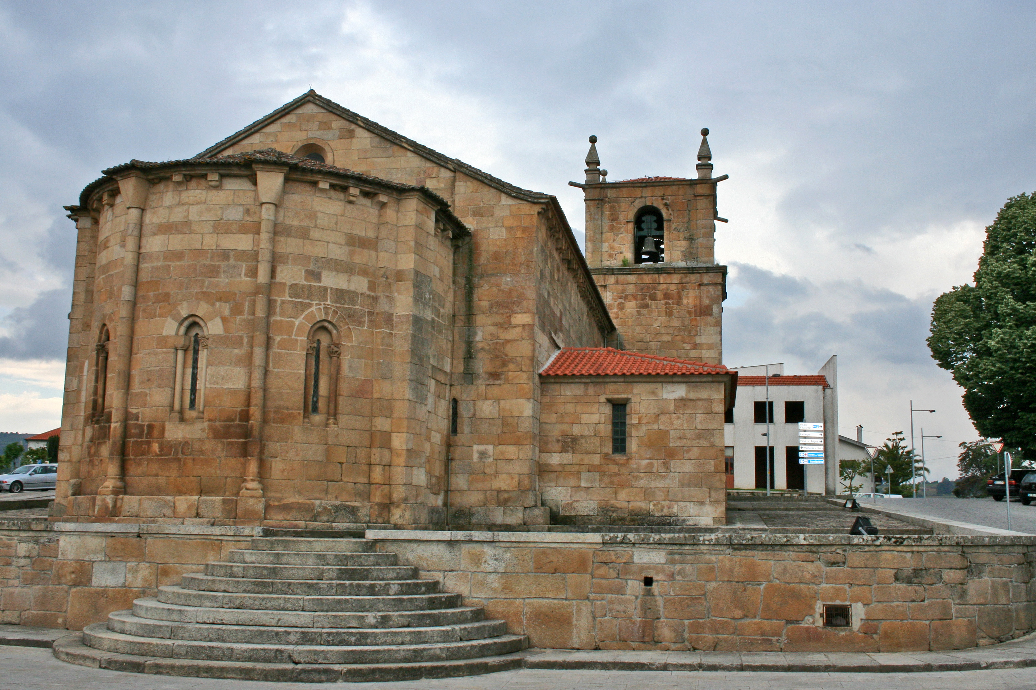 Igreja de São Miguel (Armamar) ou Igreja Matriz de Armamar This file was uploaded for Wiki Loves Monuments in Portugal with the unique identifier 70540.